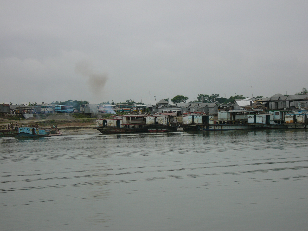 Goalanda Ghat Faridpur Bangladesh